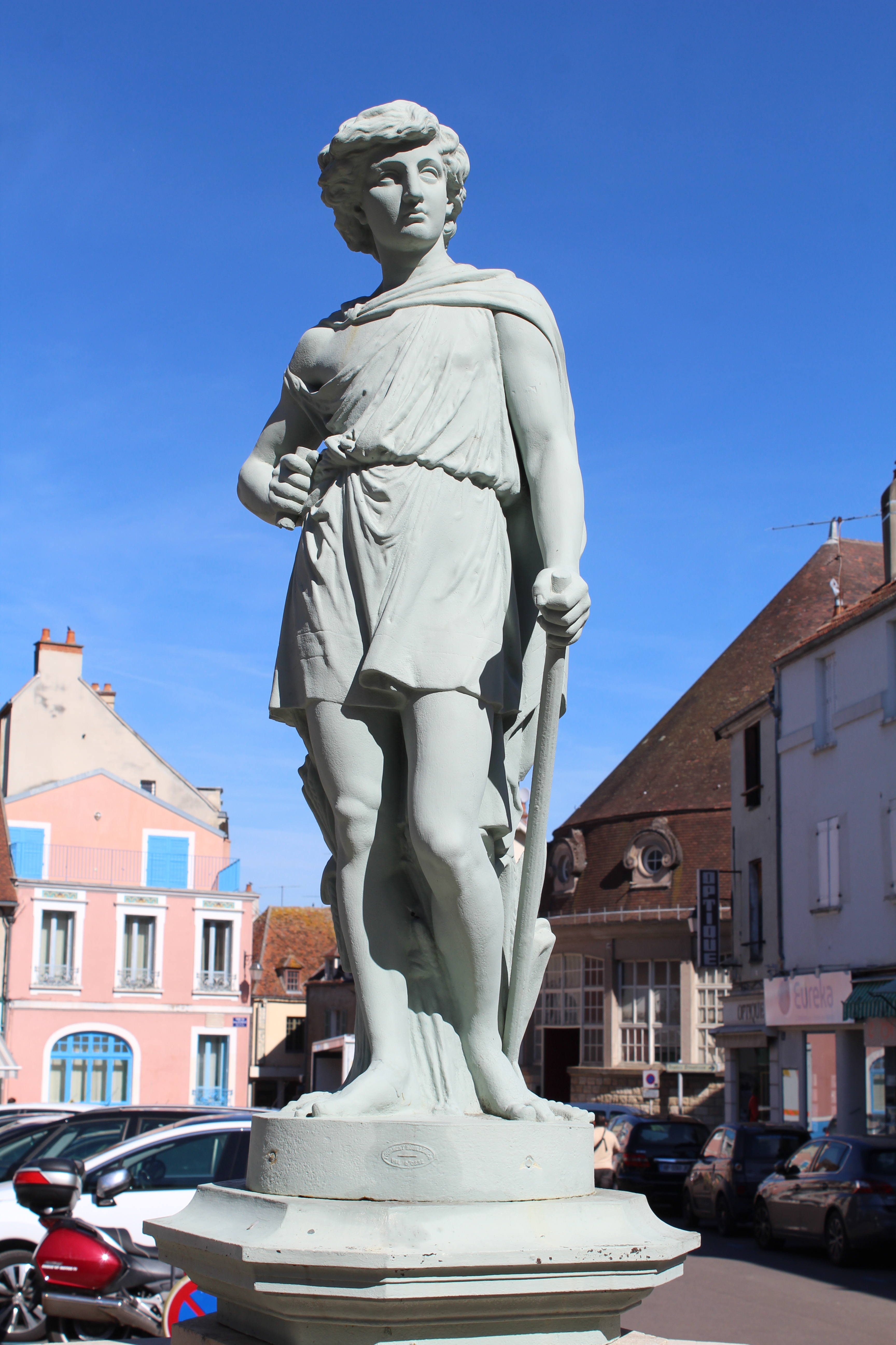 Fontaine Laboureau, Avallon.